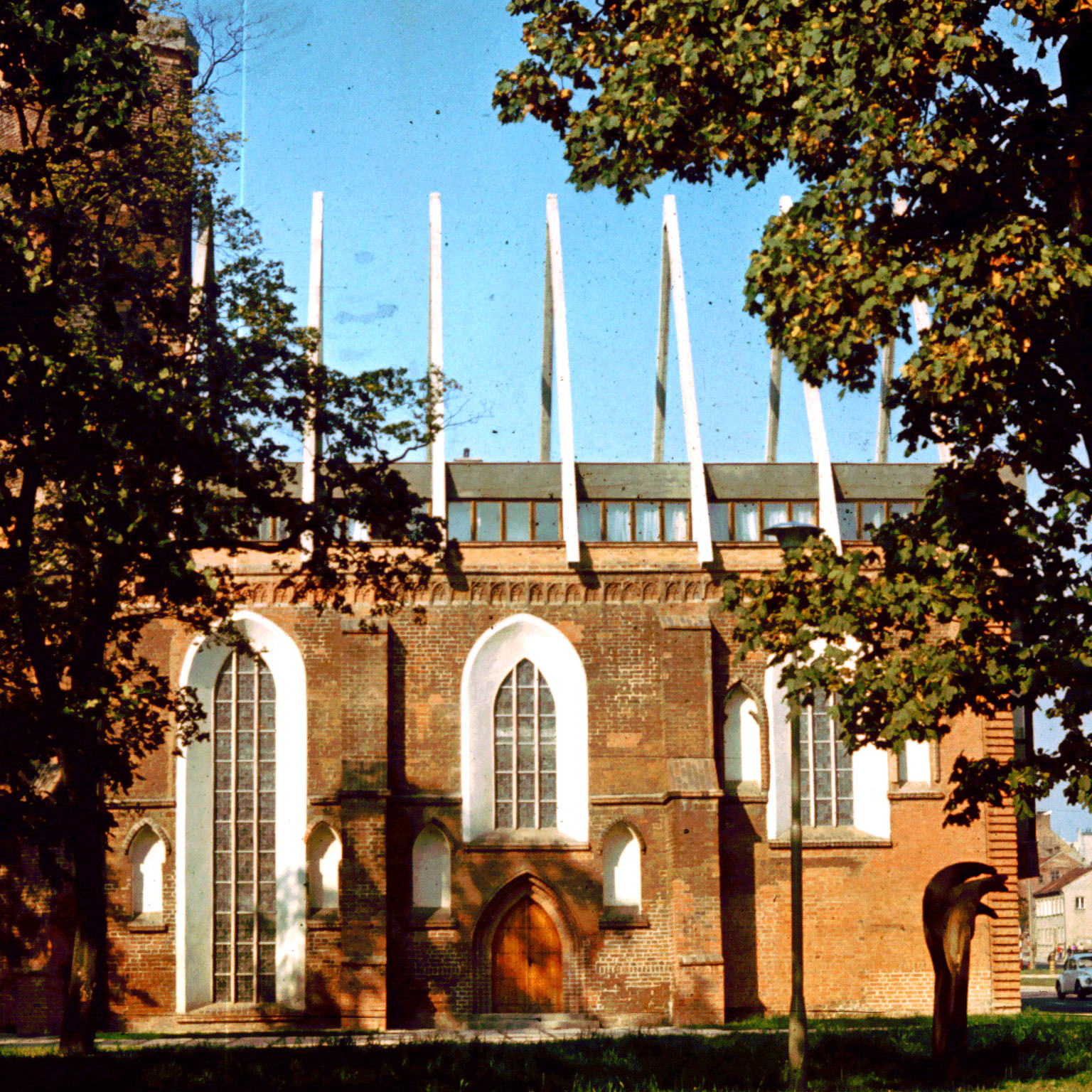 Widok kościóła po adaptacji na Spółdzielczy Dom Kultury "Pegaz"